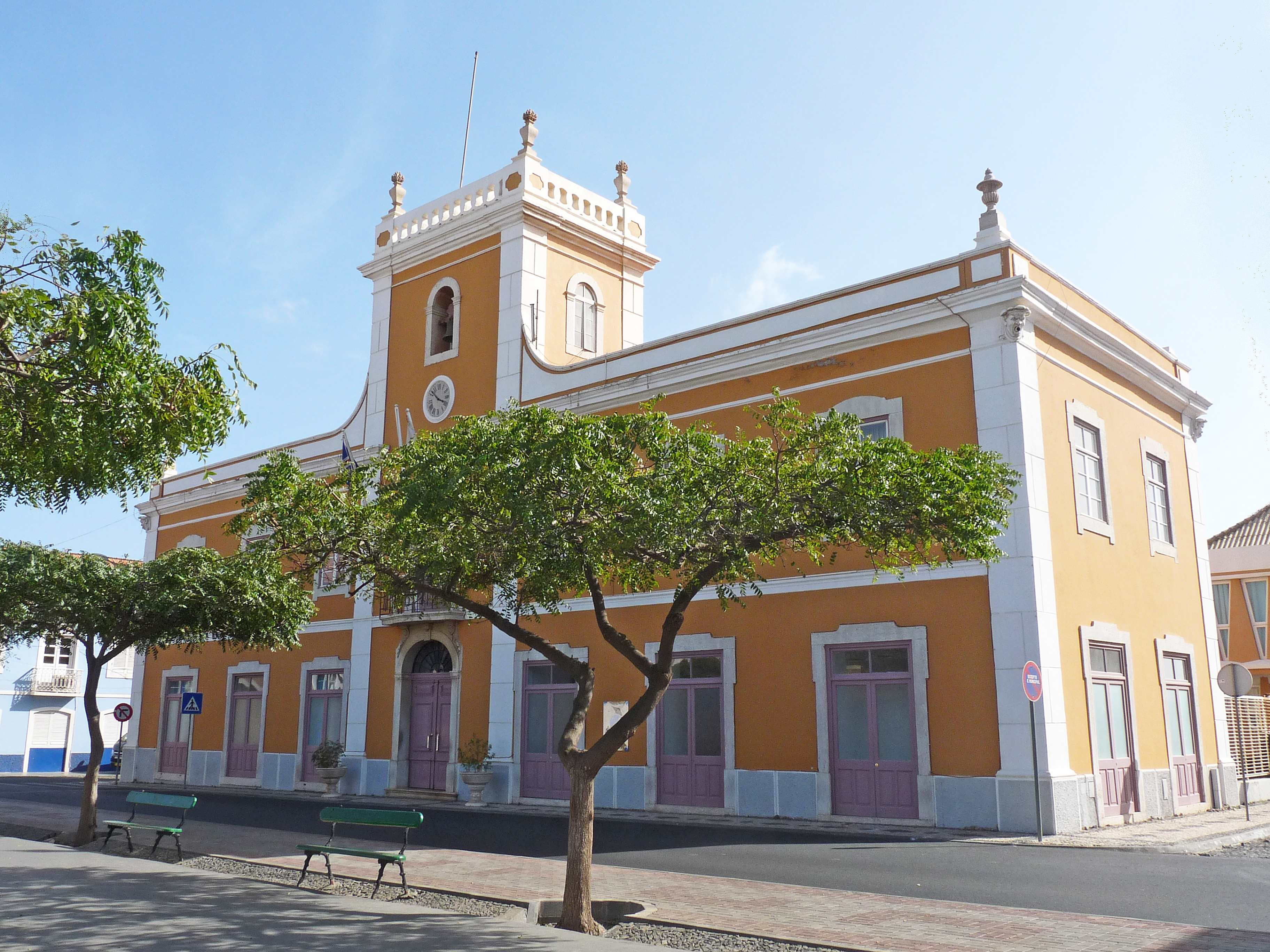 Praia (Cap-Vert) : Hôtel de ville